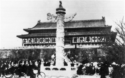 1937年（民国二十六年），日本扶植的傀儡政权中華民國臨時政府在北京（原名北平）成立。临时政府在天安门上悬挂了巨幅标语“庆祝中华民国临时政府成立”。